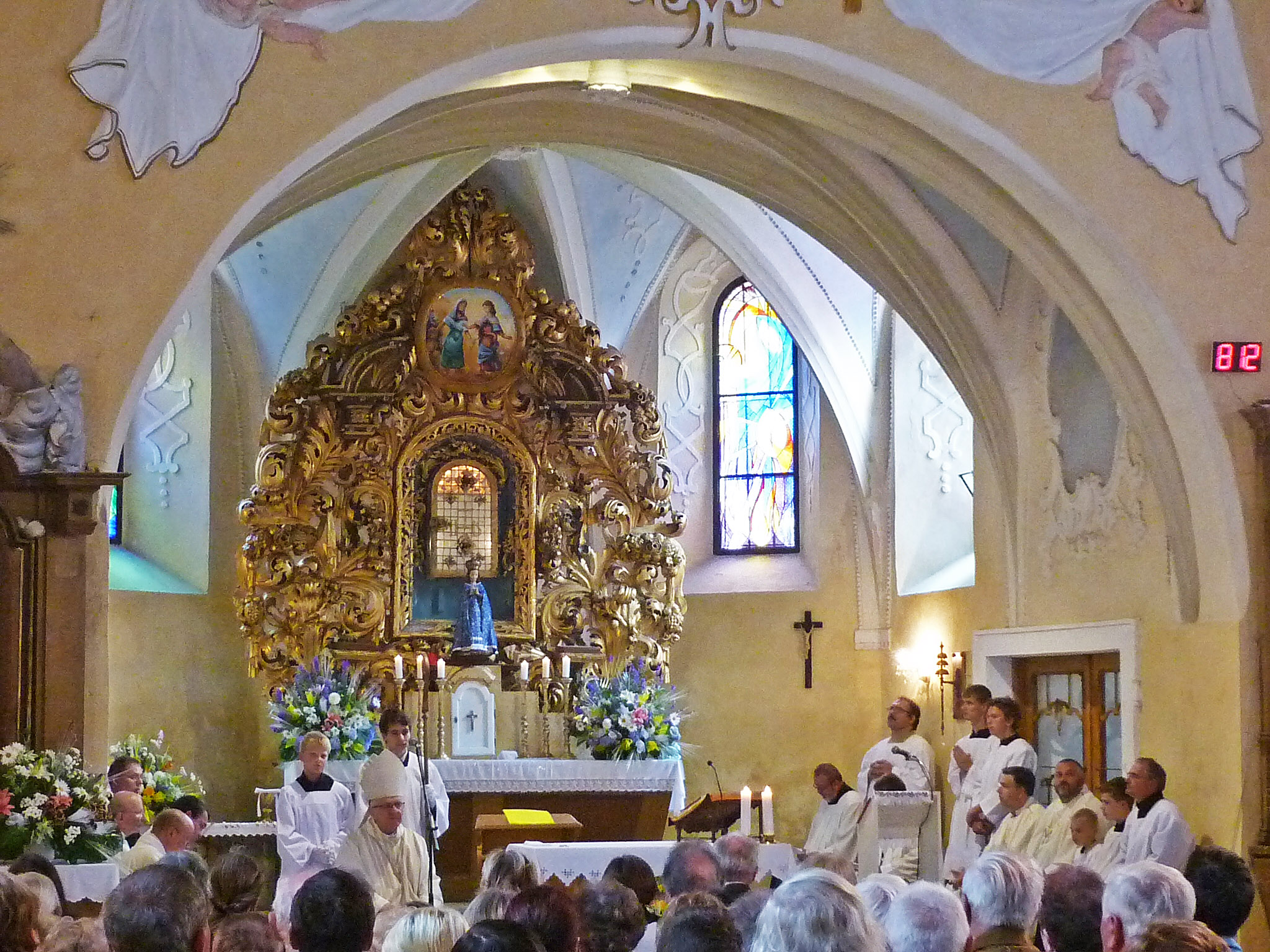 Messe mit Jan Baxant (Bischof von Leitmeritz) in der Wallfahrtskirche Mariä Heimsuchung in Quinau (Květnov) bei Komotau (Chomutov)